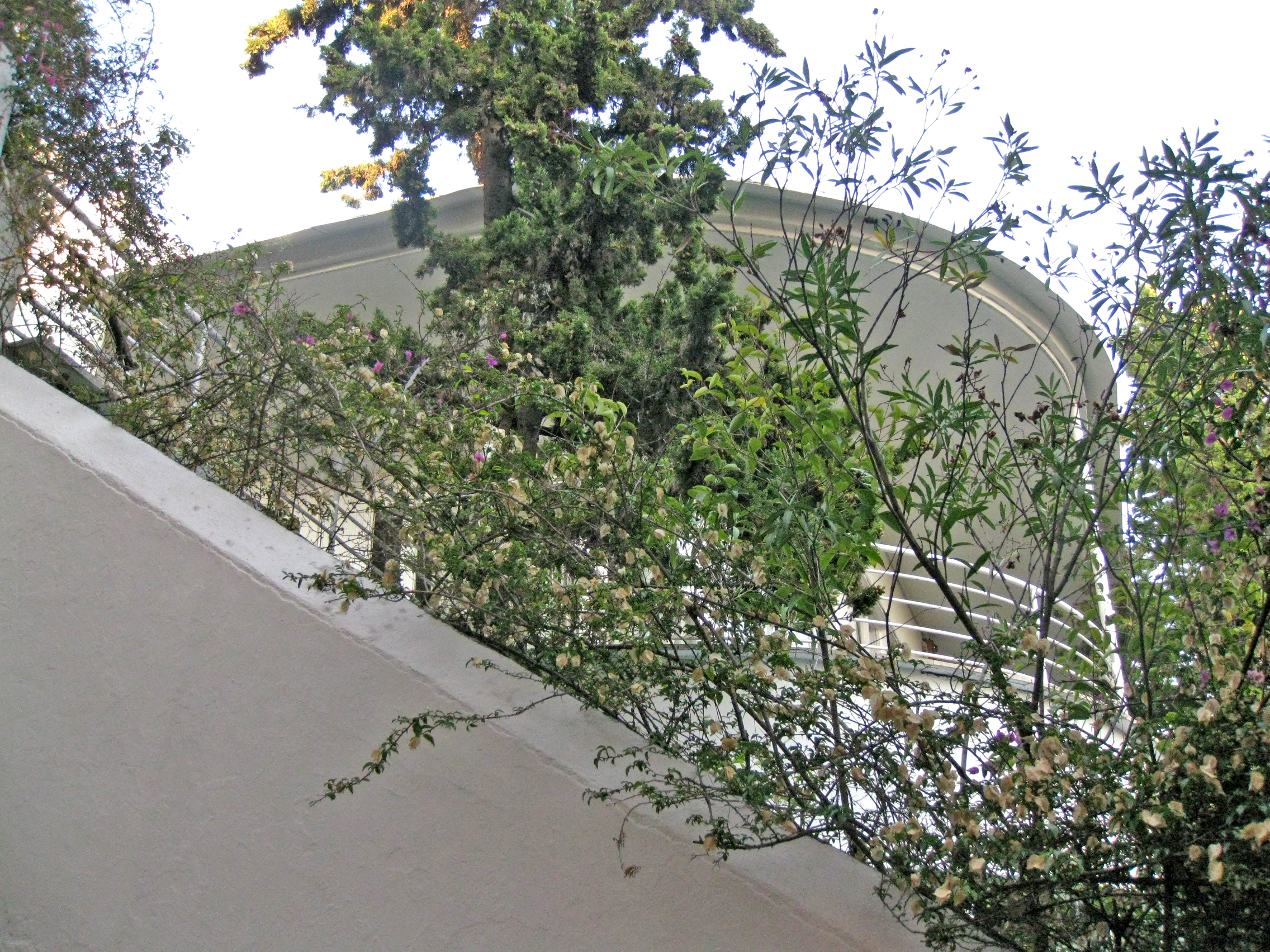 Casa Vilaró, edifici de Sixt Illescas (1929-30), a l'avinguda del Coll del Portell núm. 43 i 67, al barri de la Salut de Barcelona. Des de l'exterior resulta gairebé inapreciable a causa de les altes tàpies i els arbres que l'envolten. És un dels primers edificis construïts a Barcelona seguint els esquemes de l'arquitectura racionalista.